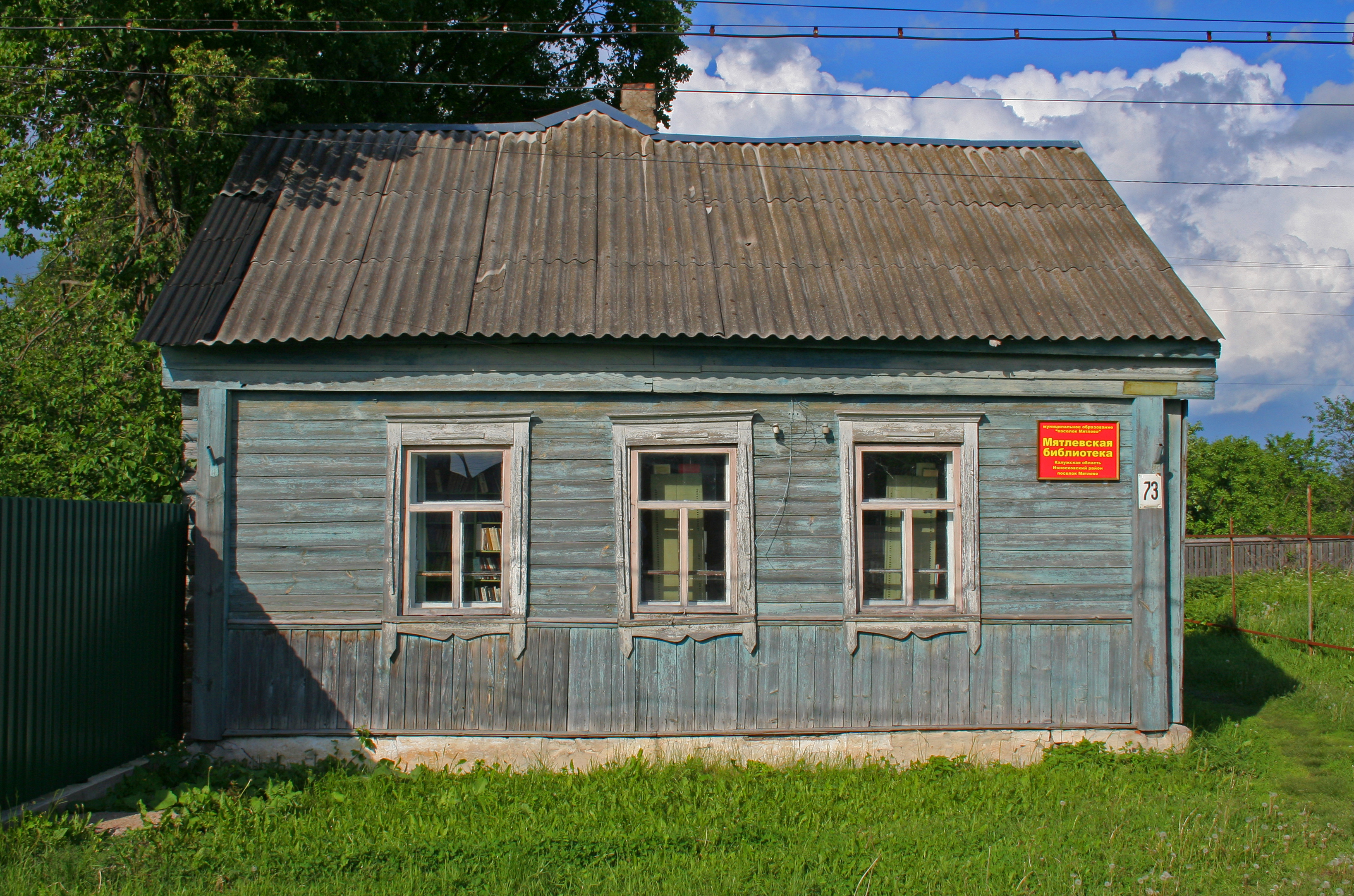 Siedlung Mjatlewo, Oblast Kaluga, Russland. Bücherei.